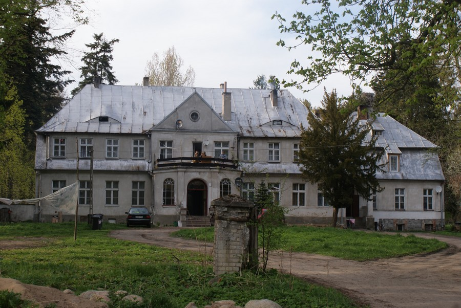 Pałac w Głodzinie